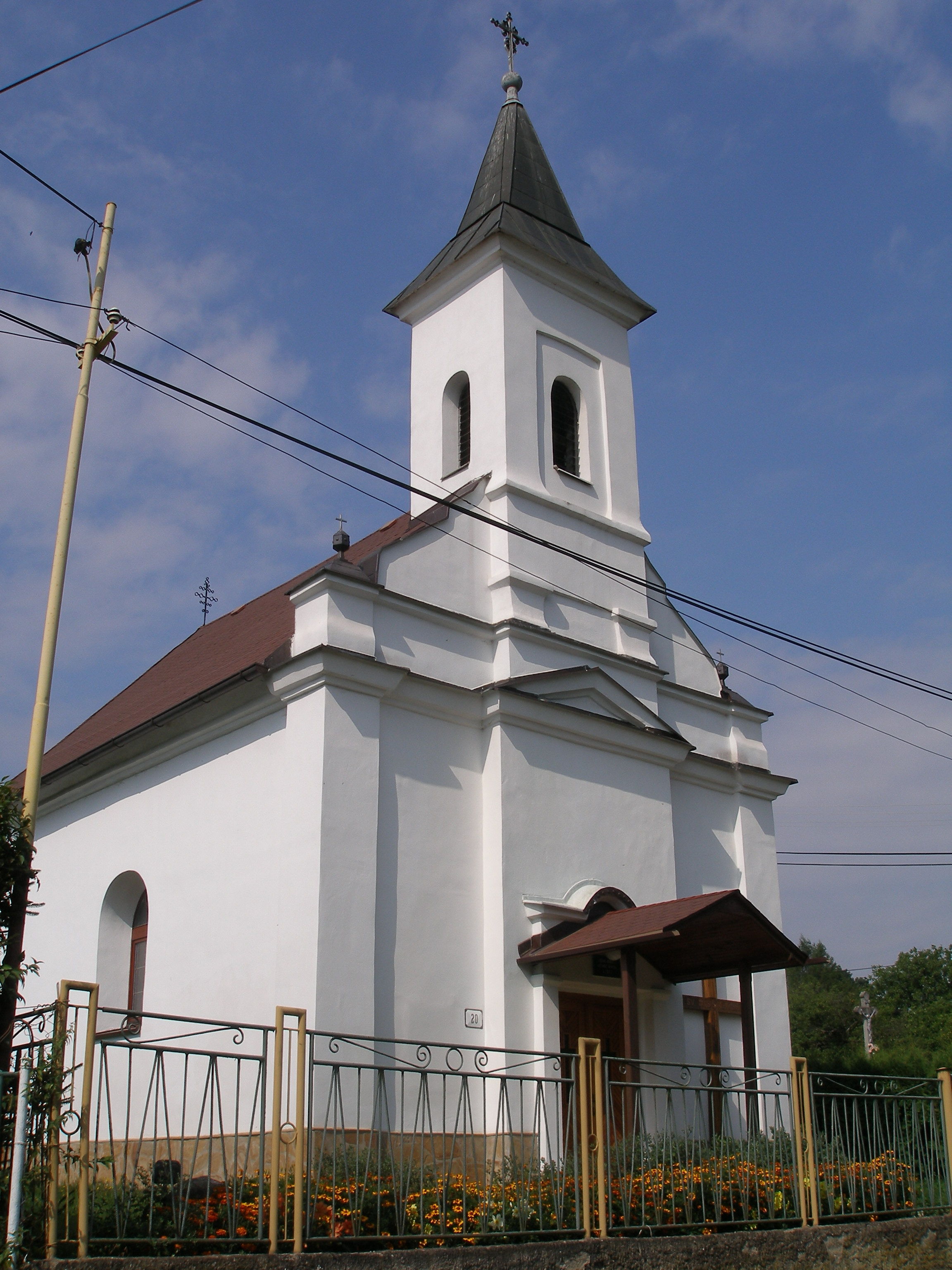 Šarišská obec Lažany